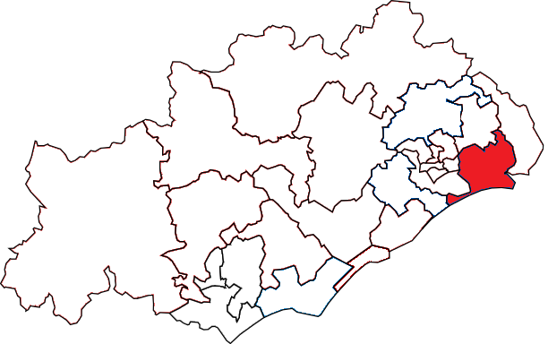 Situation du canton dans le département de l'Hérault